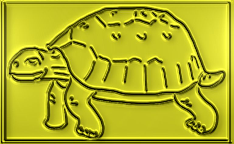 Draw for jabuti doirado